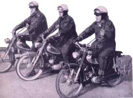 Raufoss på tur